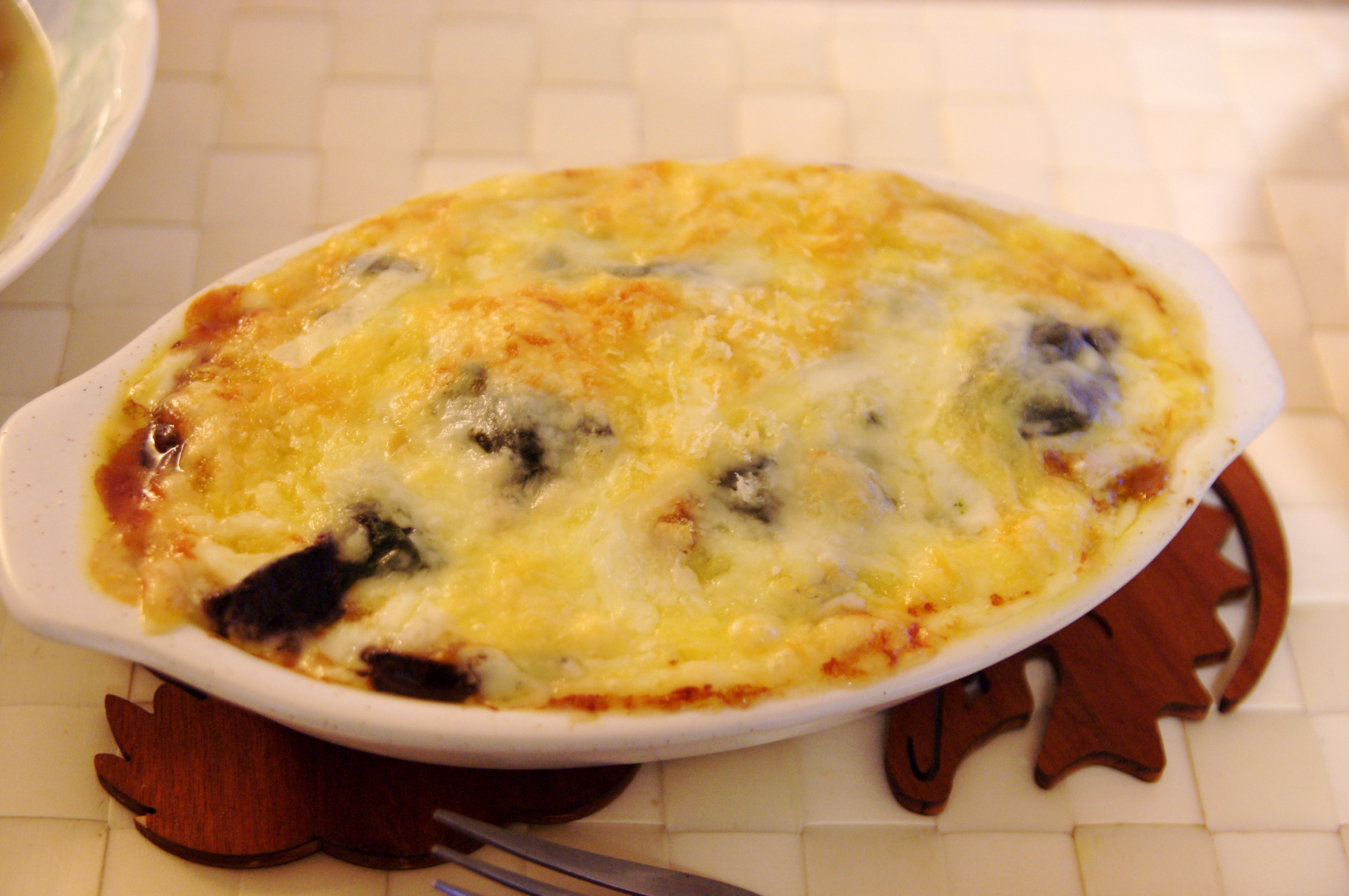 Tian d'aubergine